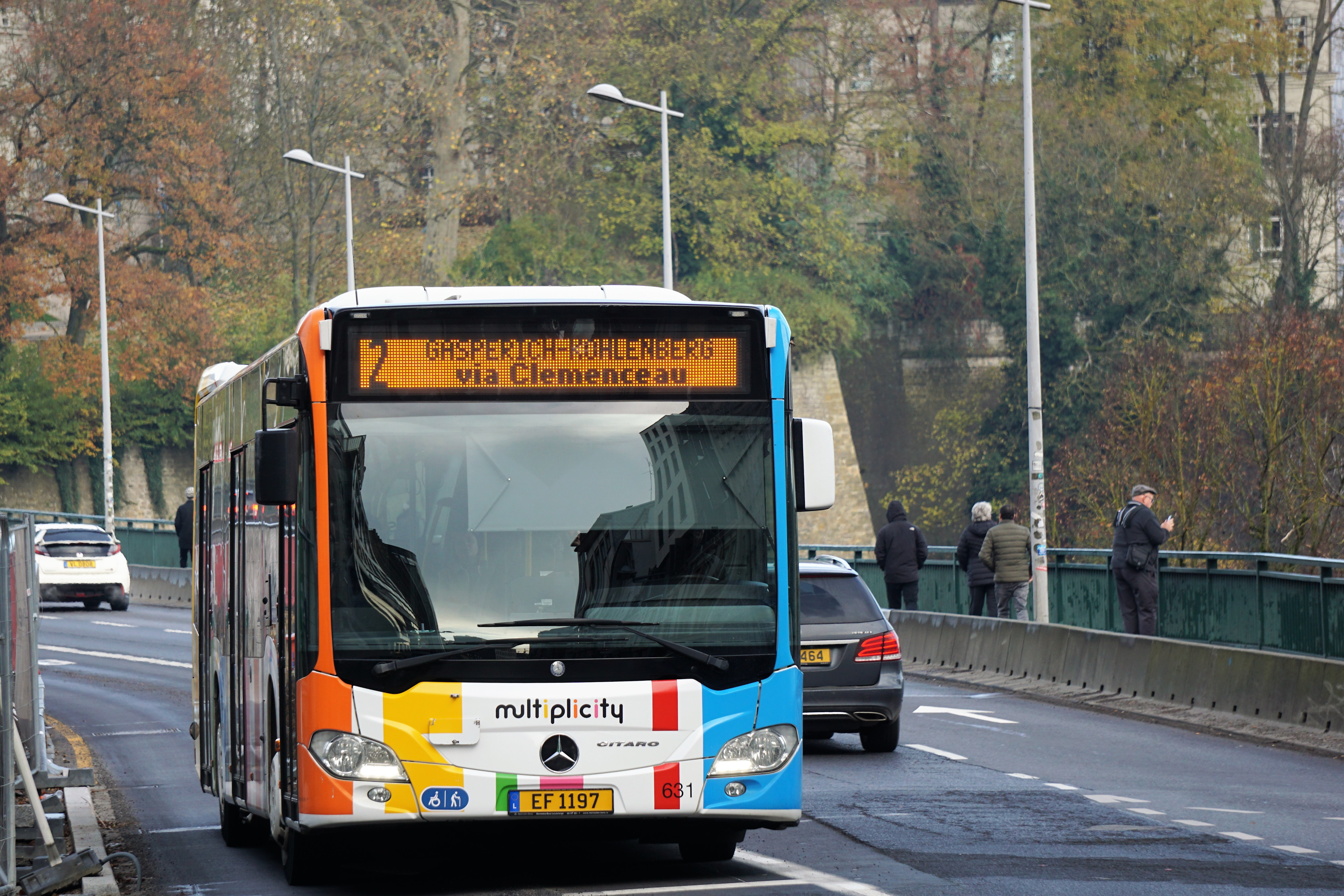 Luxembourg, bus AVL-E.Frisch 631 (#EF1197) sur une ligne 2 du pont Viaduc en direction de Gasperich.